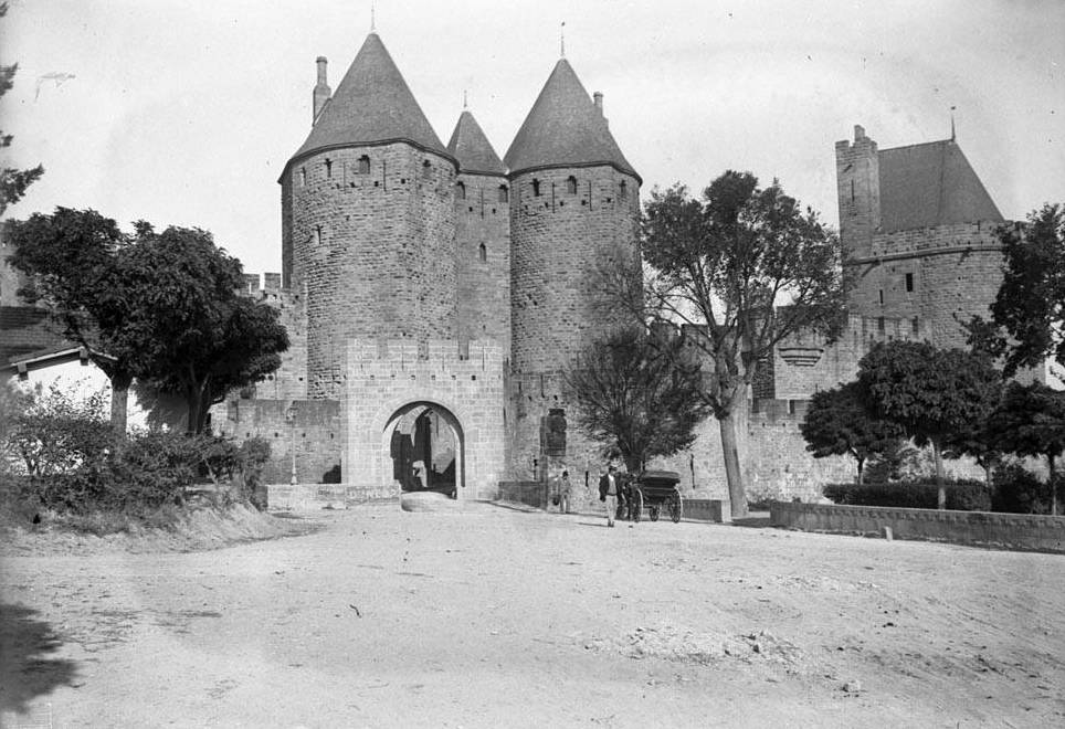 Imatge